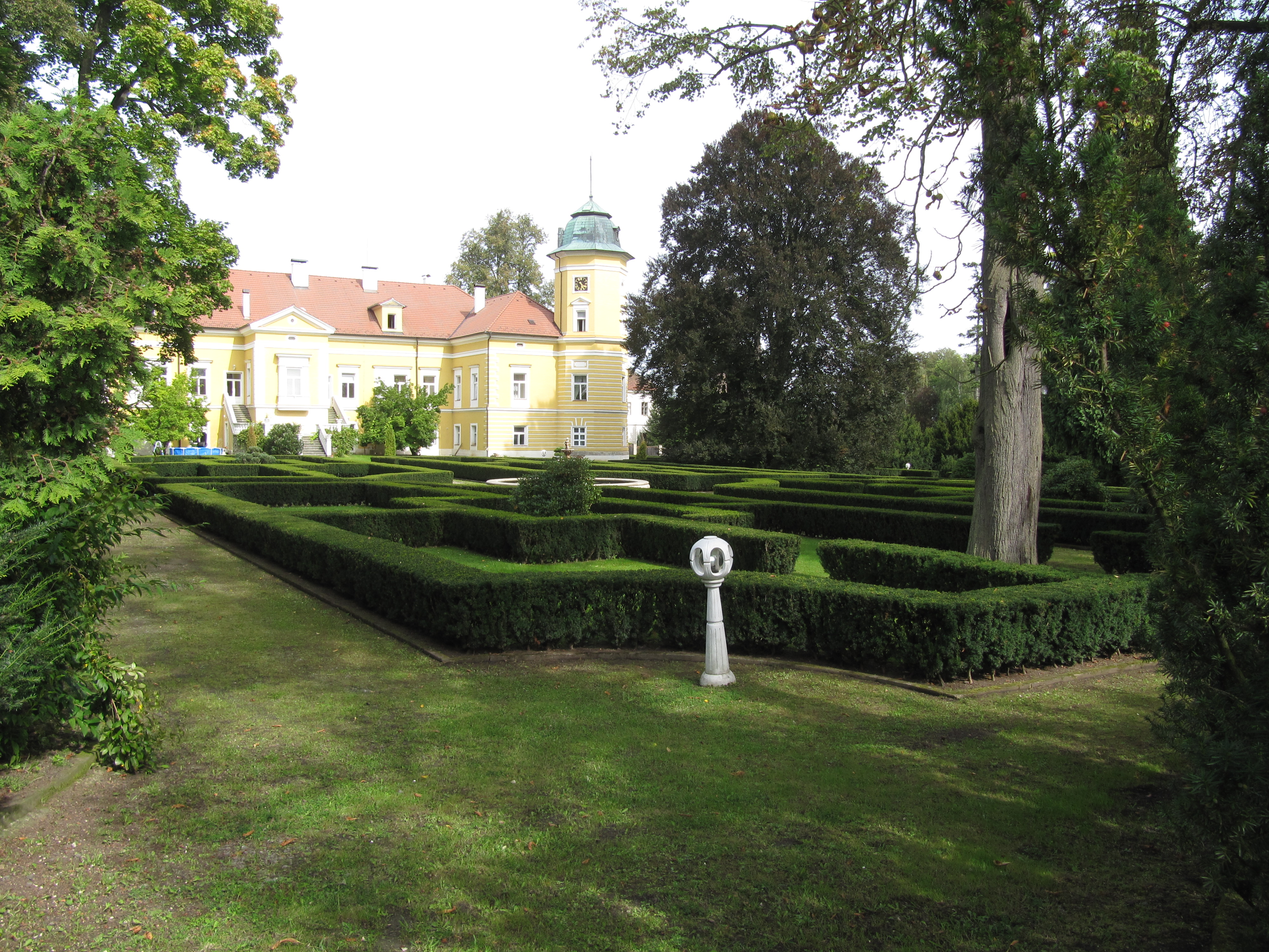 Chotoviny